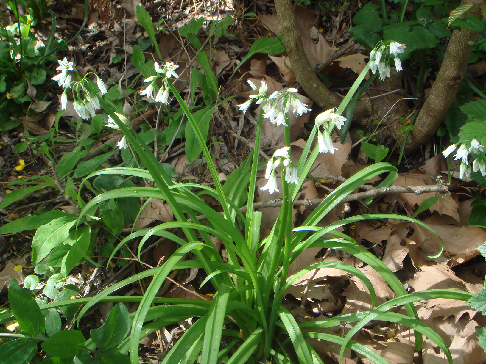 (Allium triquetrum), Ceuta, España